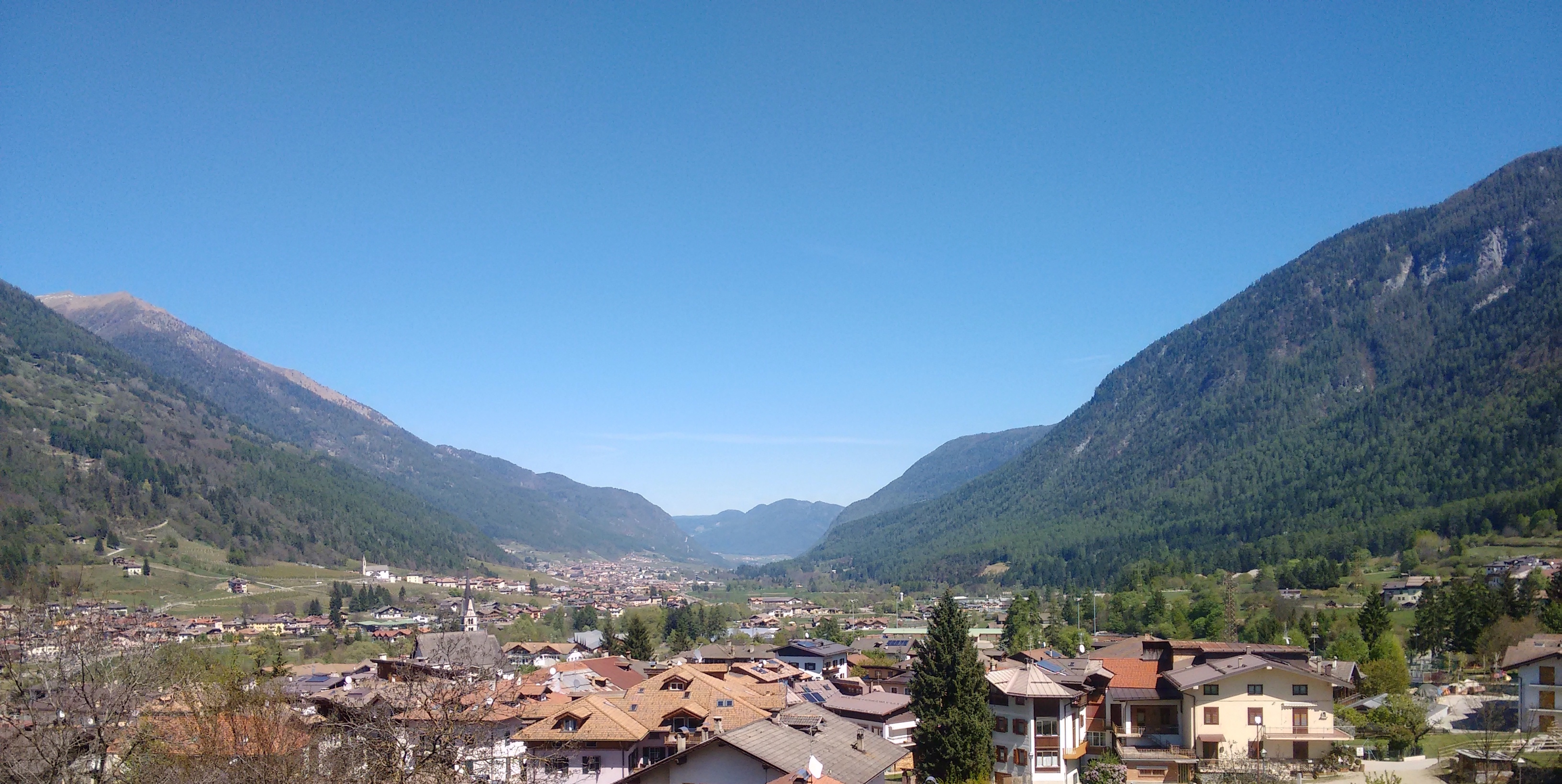 Panorama della Val di Sole da Dimaro.